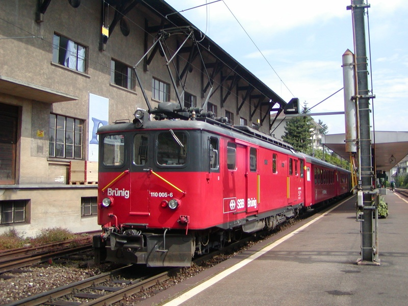 SBB Hergiswil